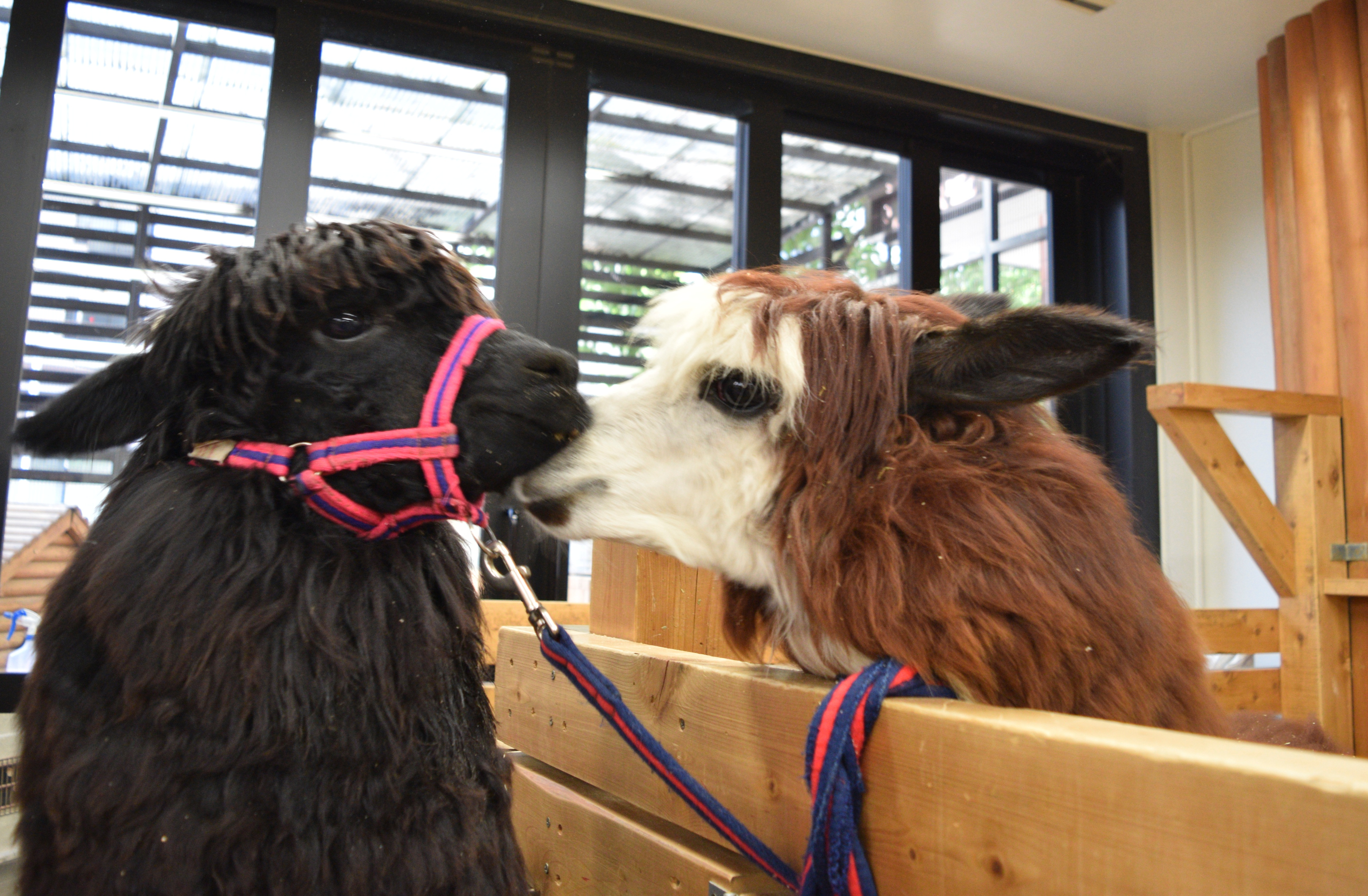 大阪ＥＣＯのアルパカ